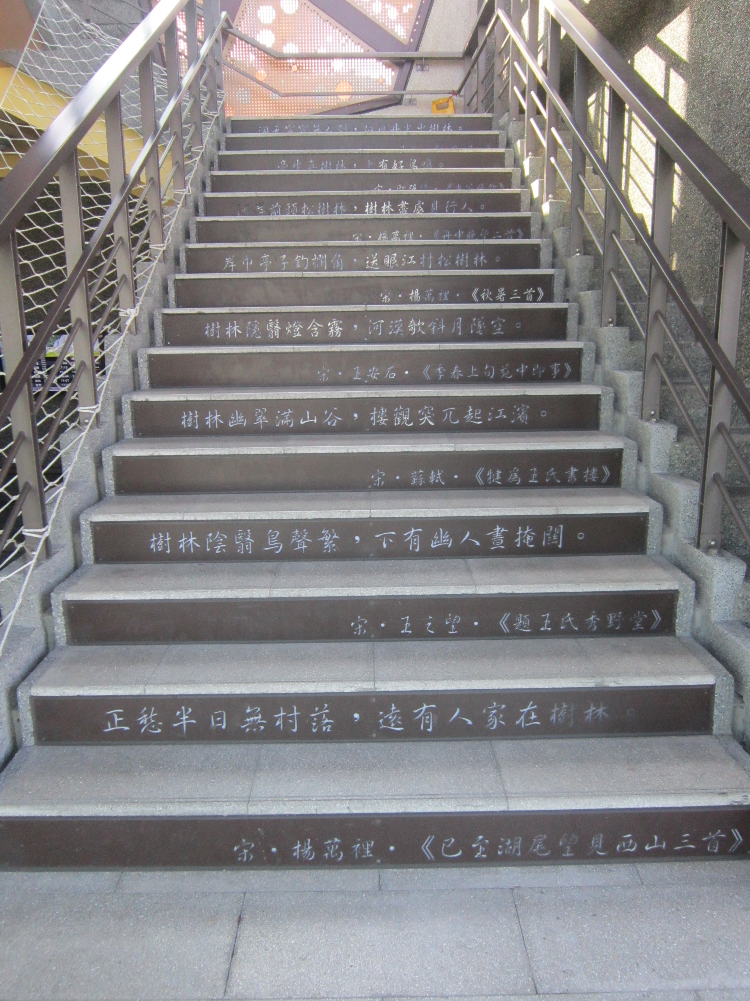 南樹林車站大樓台階上經典詩句(含有"樹林"一詞)